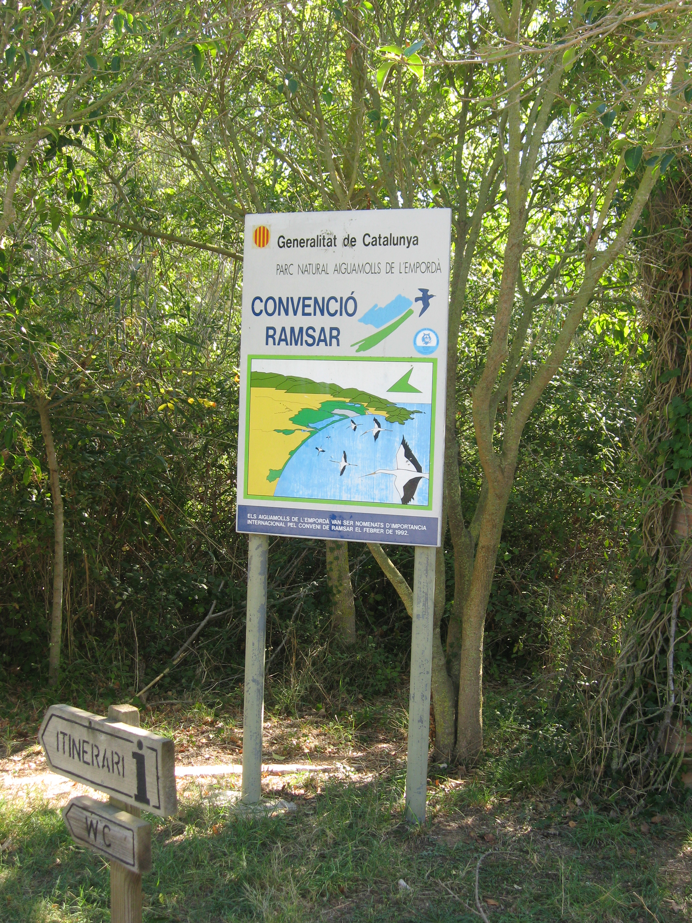 Hinweistafel im Naturpark Aiguamolls de l’Empordà Datum: 15.09.2010 Urheber: Michael Pfeiffer alias Benutzer:Gordito1869 Quelle: privates Fotoarchiv des Urhebers